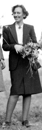 לאה גולדברג